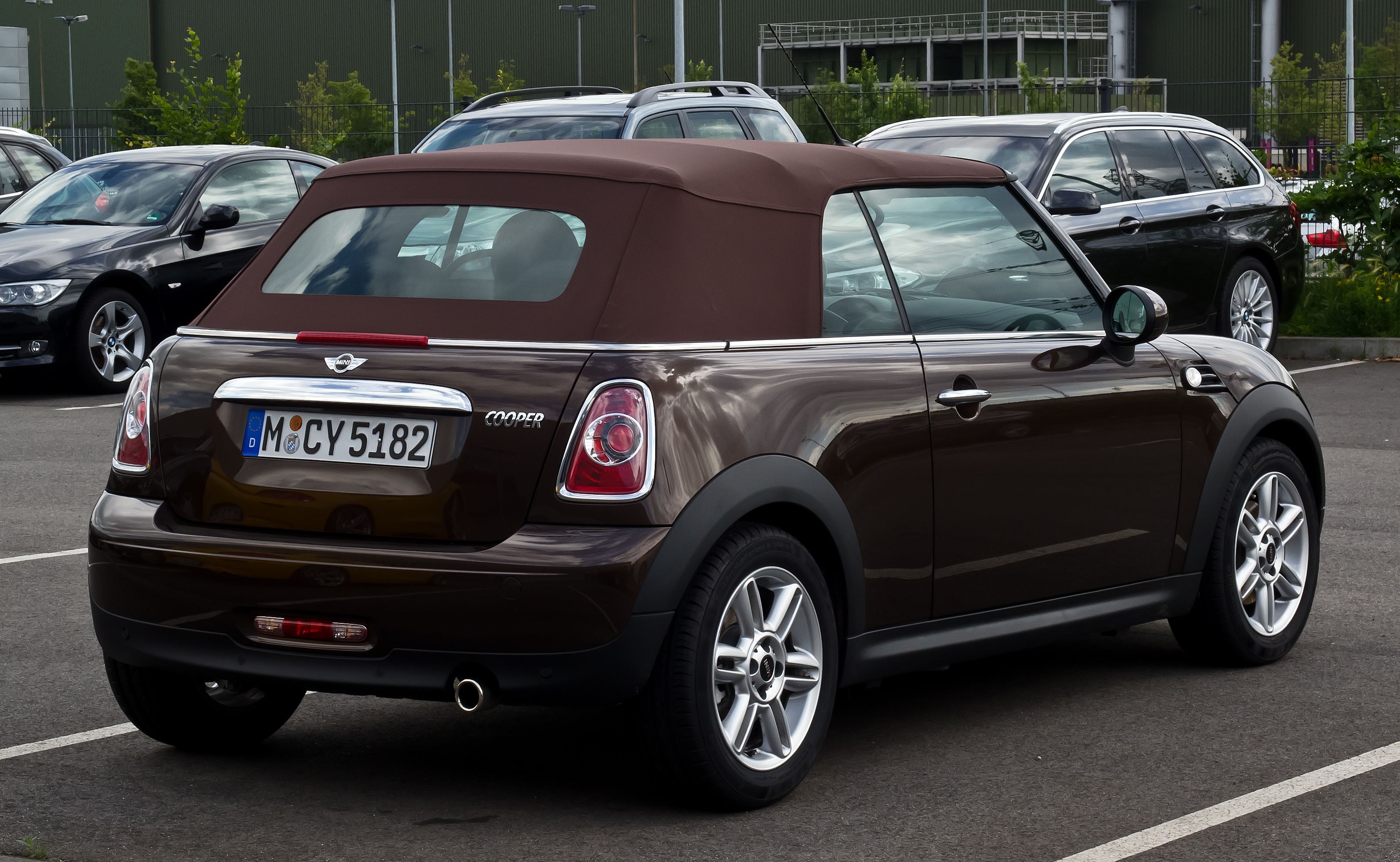 Mini Cooper Cabriolet (R57, Facelift)